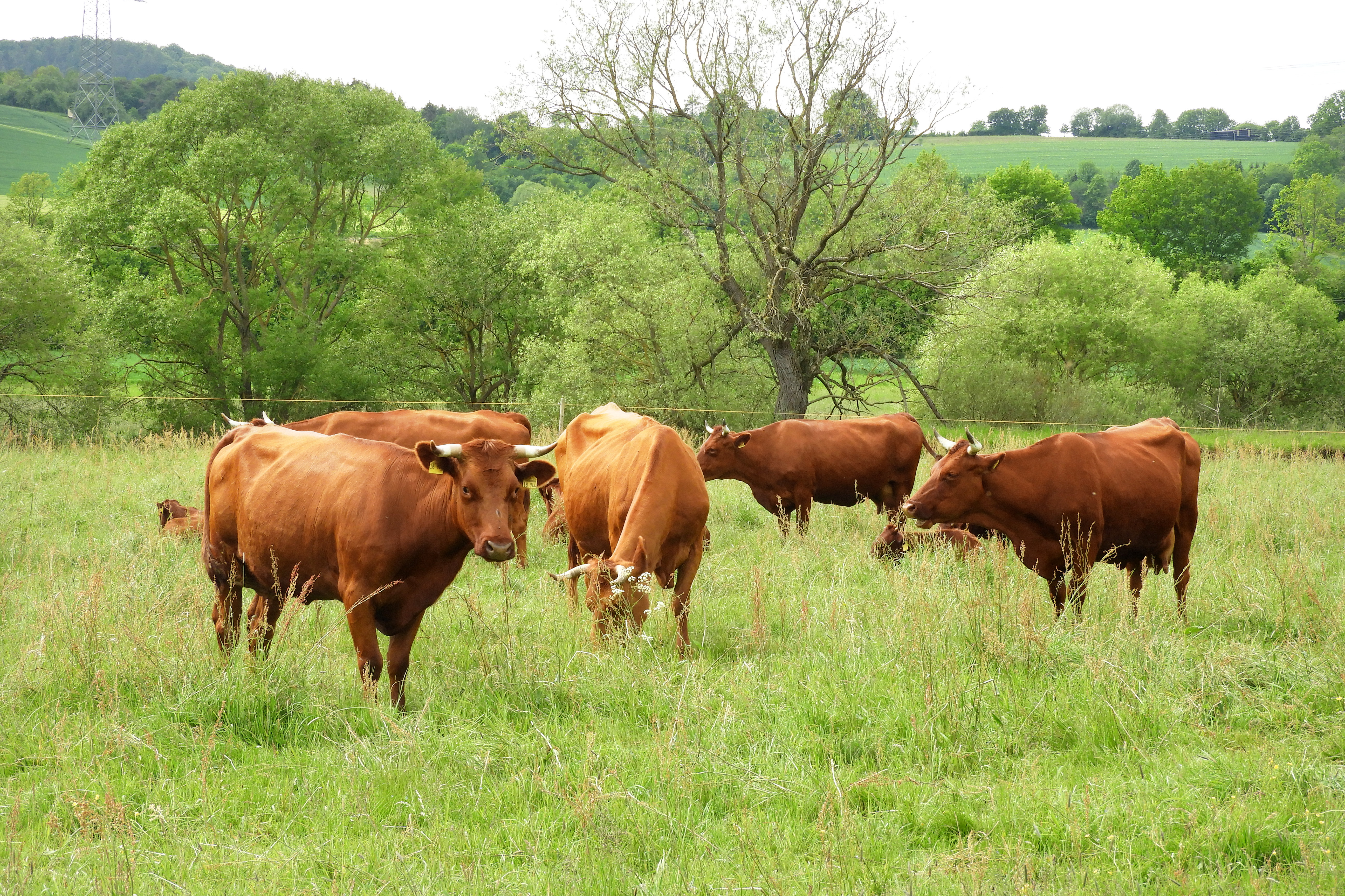 Die „Alte Fulda bei Blankenheim“ ist ein Altwasserbiotop am Mittellauf der Fulda nordöstlich der Gemeinde Blankenheim, einem Stadtteil von Bebra im Landkreis Hersfeld-Rotenburg. Als regional bedeutende Lebensstätte brütender und „Trittstein" für durchziehende Vogelarten ist der im Dezember 1981 zum Naturschutzgebiet erklärte Bereich aus ornithologischer Sicht von großer Bedeutung. Das Naturschutzgebiet liegt vollständig in dem Flora-Fauna-Habitat-Gebiet 5024-305 „Auenwiesen von Fulda, Rohrbach und Solz“, EU-Vogelschutzgebiet 5024-401 „Fuldatal zwischen Rotenburg und Niederaula“ und Landschaftsschutzgebiet „Auenverbund Fulda“. This is a picture of the protected area listed at WDPA under the ID 81266